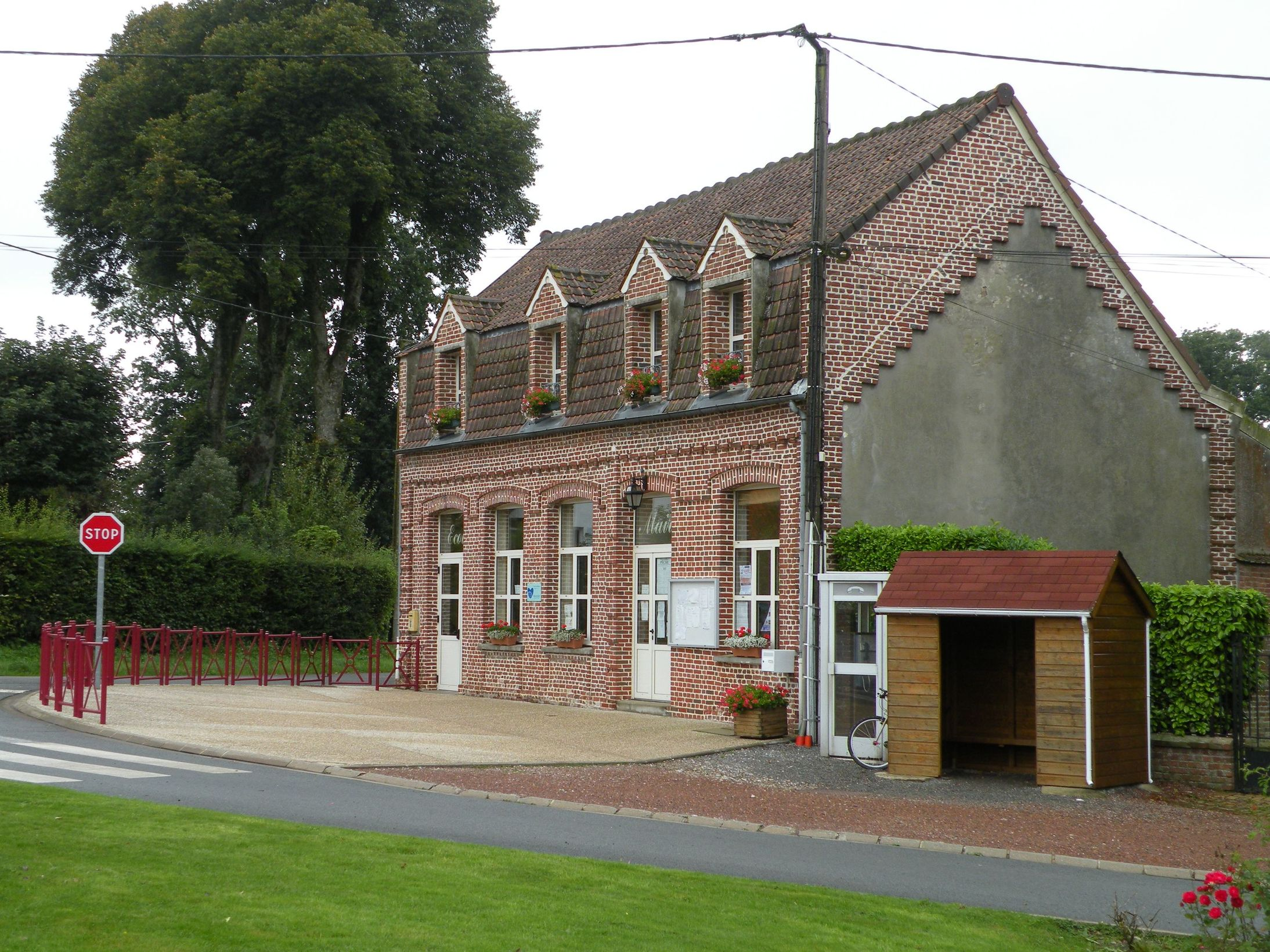 Mairie de Senlecques